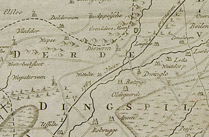 fragment van Nieuwe kaart van het vrye landschap Drenthe